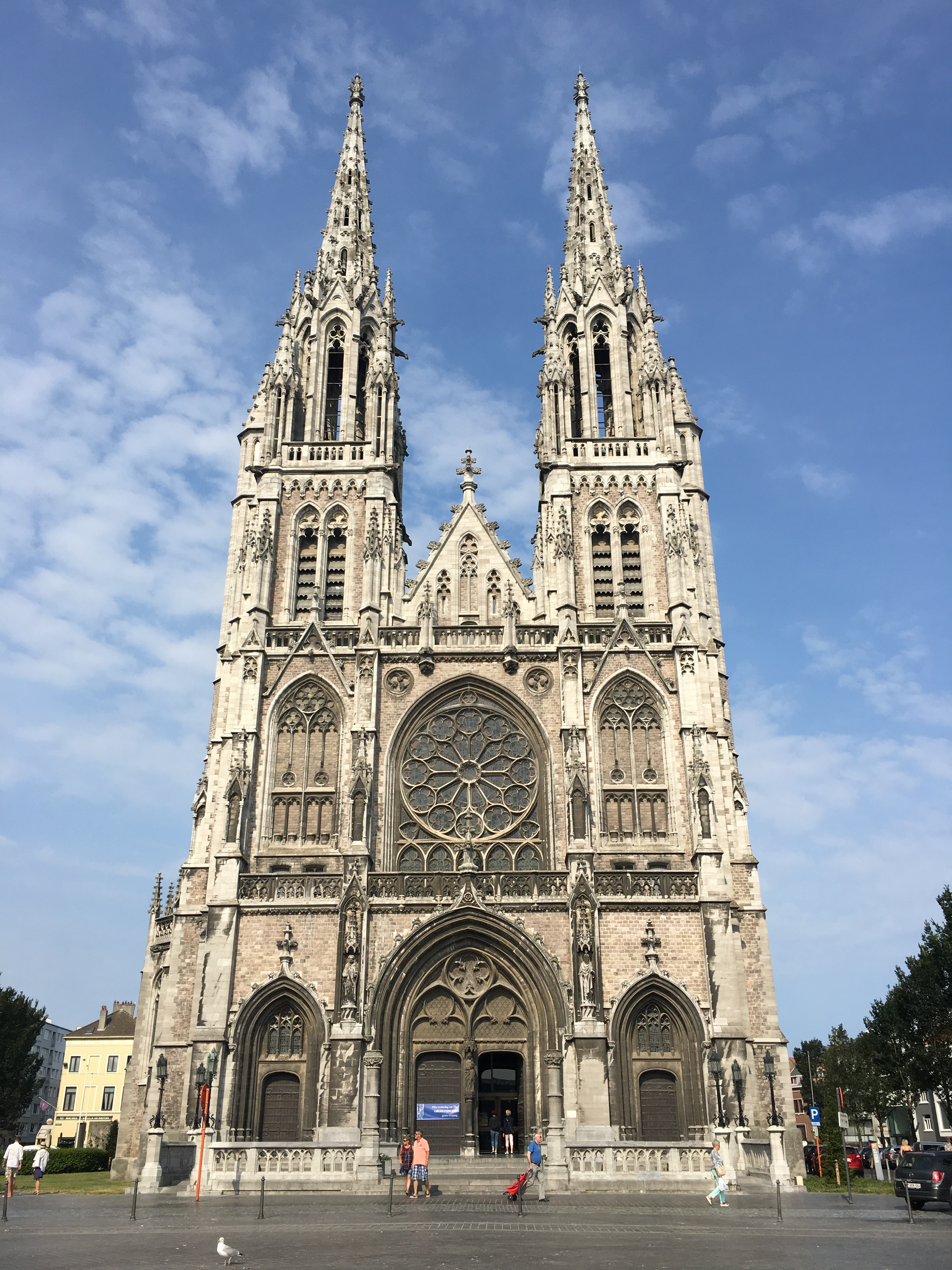 Sint-Petrus-en-Pauluskerk (Oostende)